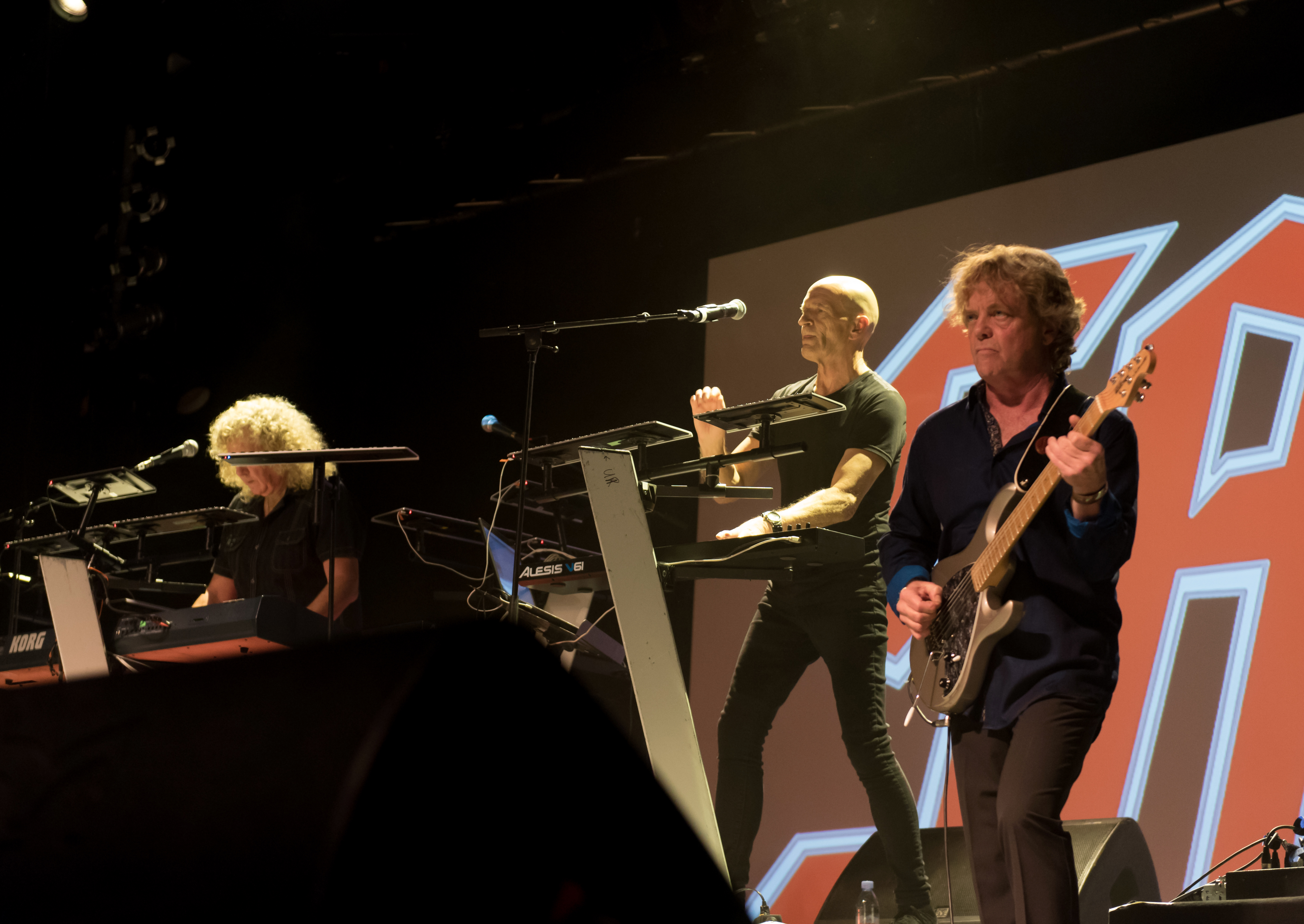 Saga bei der 40th Anniversary - The Final Chapter Tour im Docks Hamburg 2017